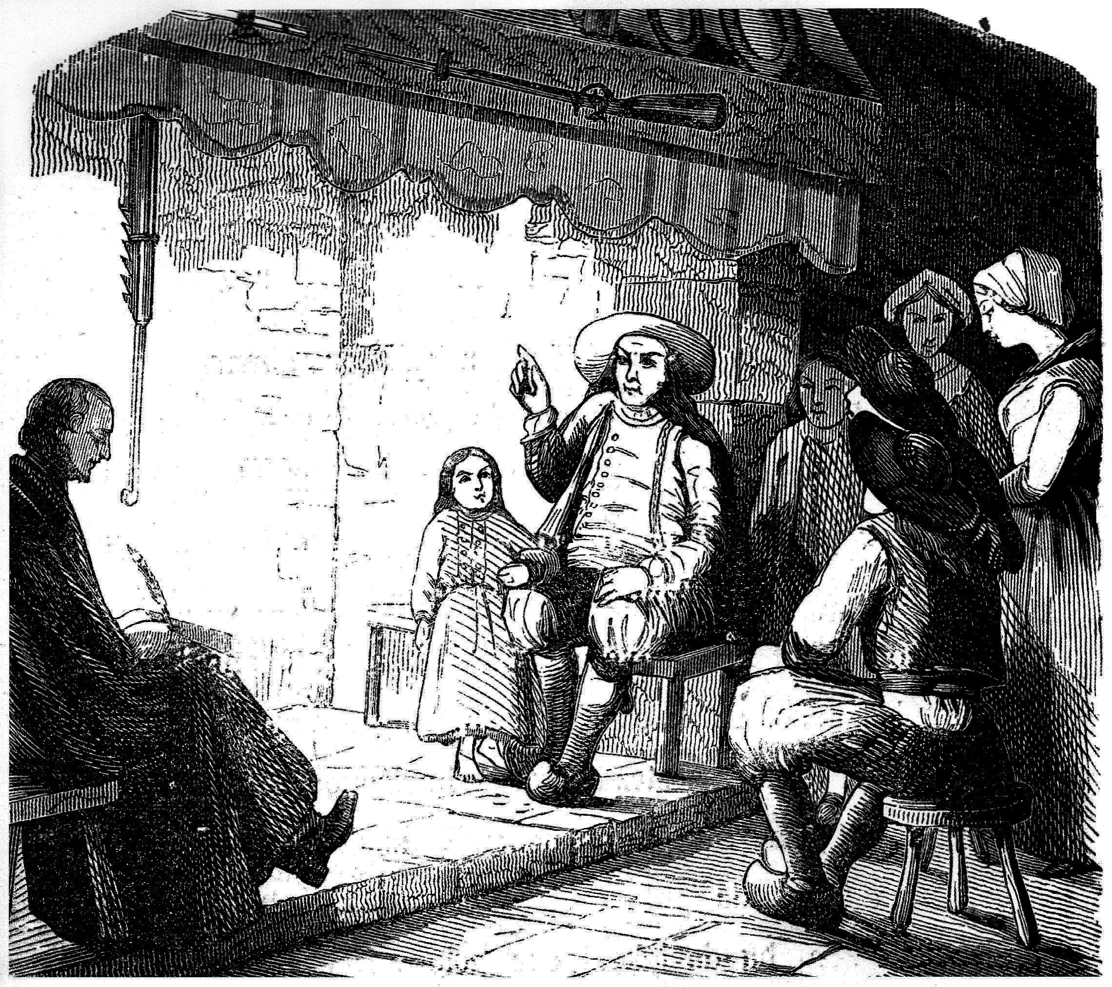 La Villemarqué à 30 ans transcrivant une chanson. Gravure par Ernest Boyer, demi-frère du poète Brizeux, 1845 (coll. F. Postic)